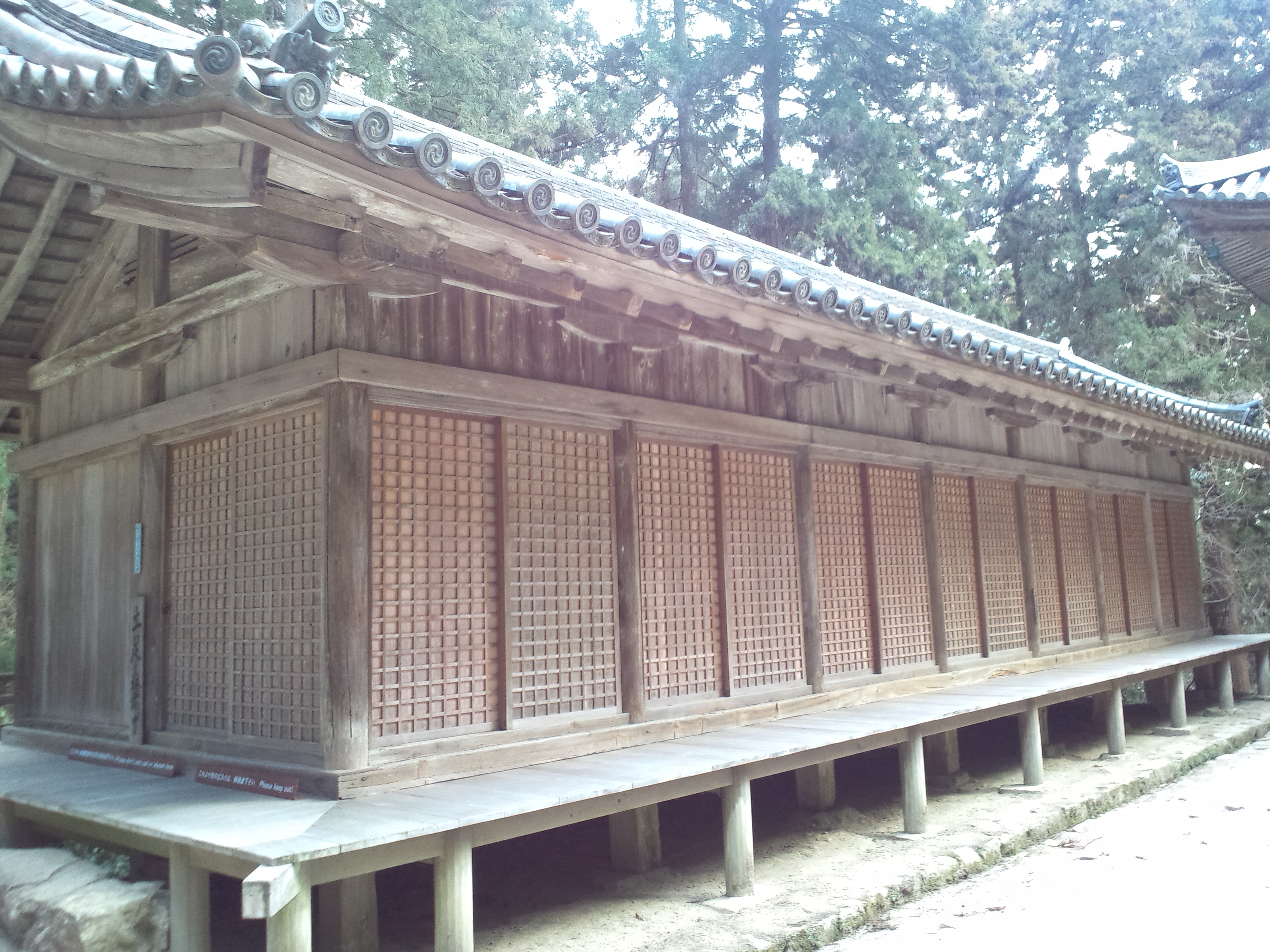 圓教寺 護法堂 拝殿